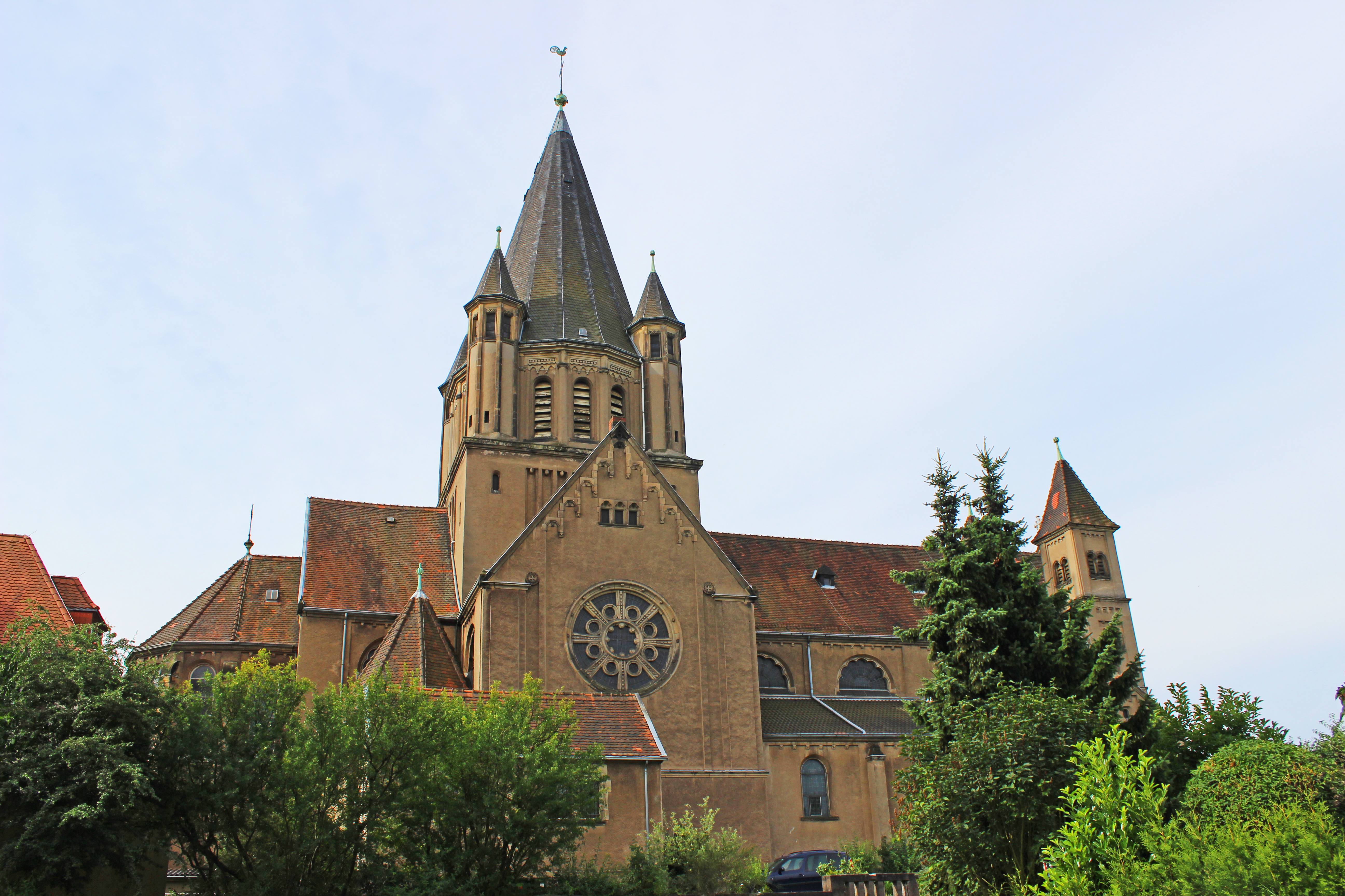 Die Herz-Jesu-Kirche in Burbach, einem Stadtteil der saarländischen Landeshauptstadt Saarbrücken